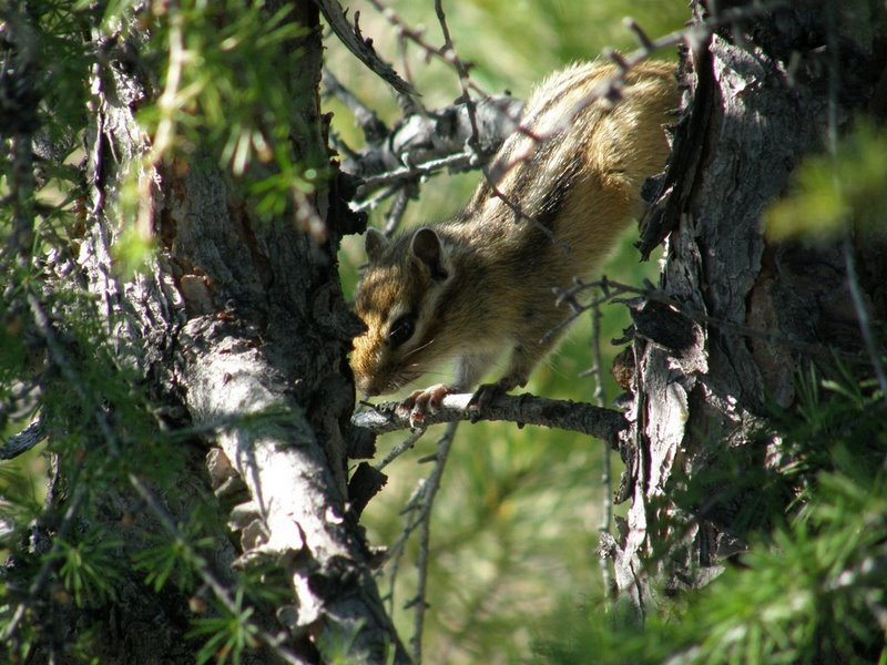 Chipmunk, Kolyma, Russia